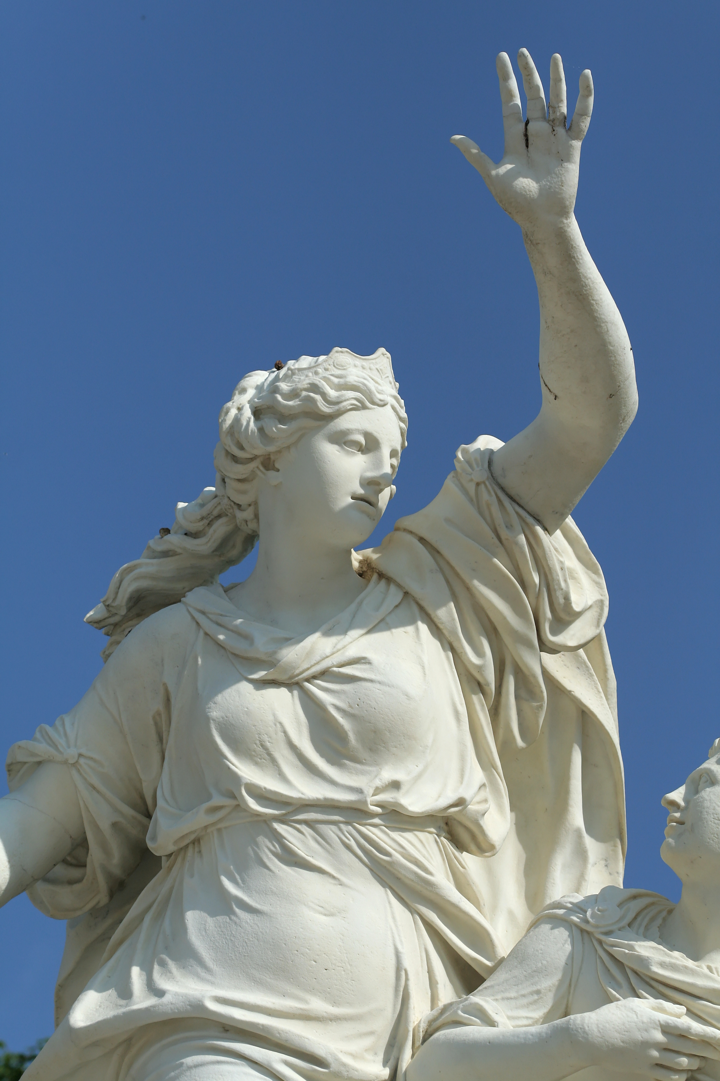 Parc de Versailles, demi-lune du bassin du Char-d'Apollon. Ino frappée de folie par Junon se jetant dans la mer avec son fils Melicerte, par Pierre Granier, 1686-1691, h. 3 m, marbre. inv1850n°9138